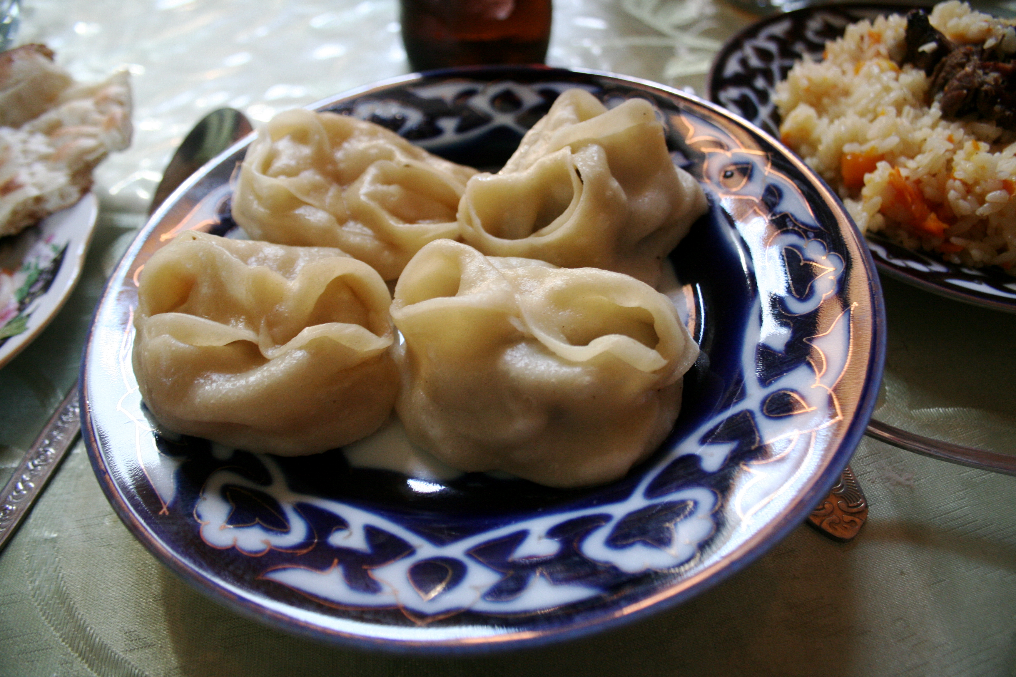 Mantı de cordero (2) calabaza (2). Khiva, Itchan Kala, Uzbekistán. Patrimonio de la Humanidad Khorezm region, Khiva, Uzbekistan. World Heritage